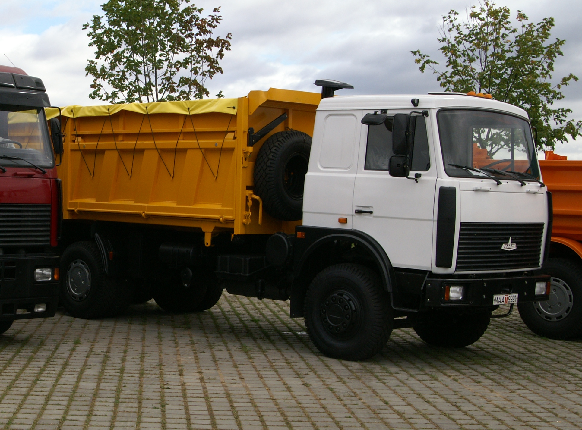 MAZ trucks in Minsk